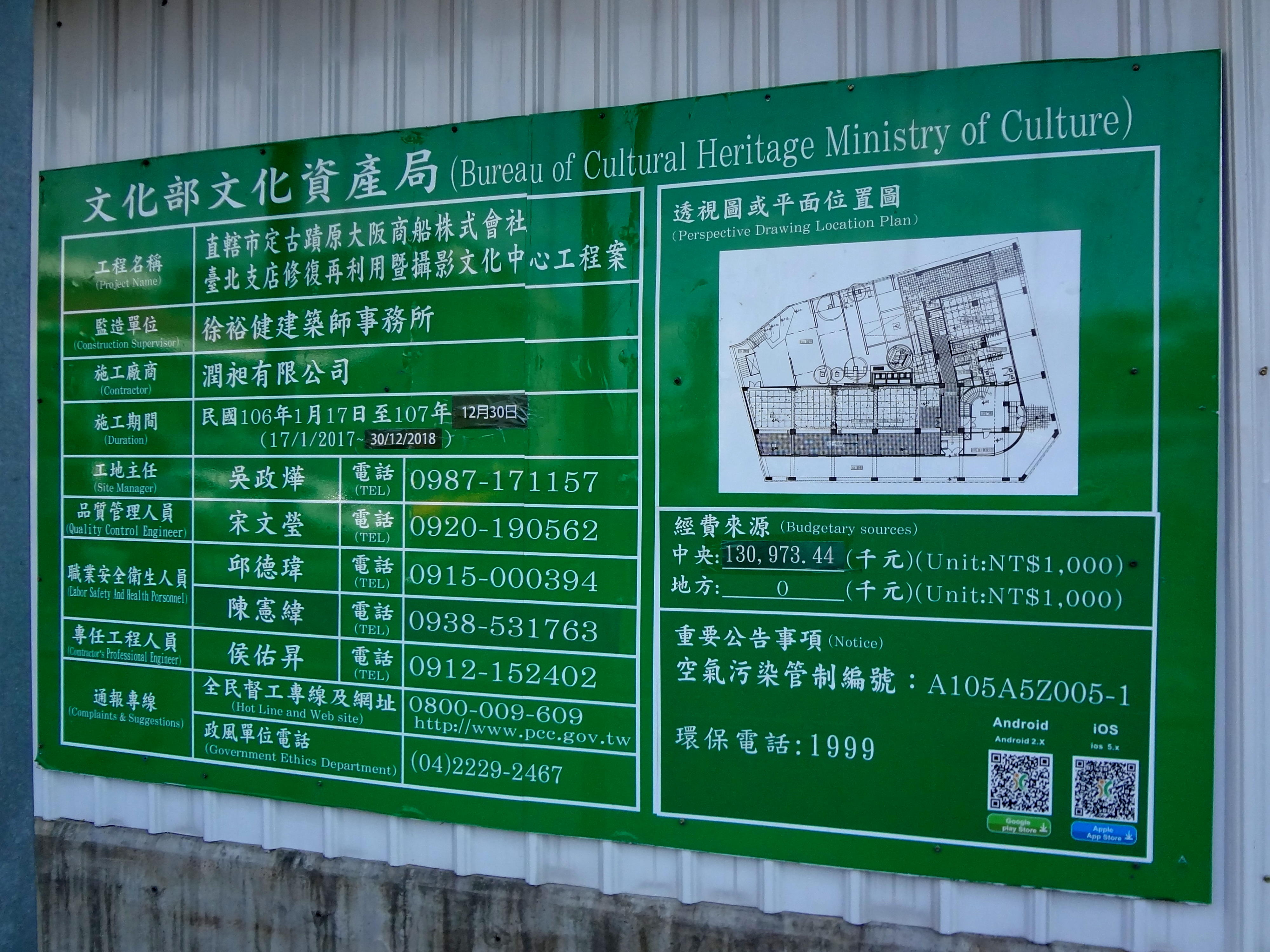 中文（台灣）: 文化部文化資產局建置的原大阪商船臺北支店修復工程告示牌。